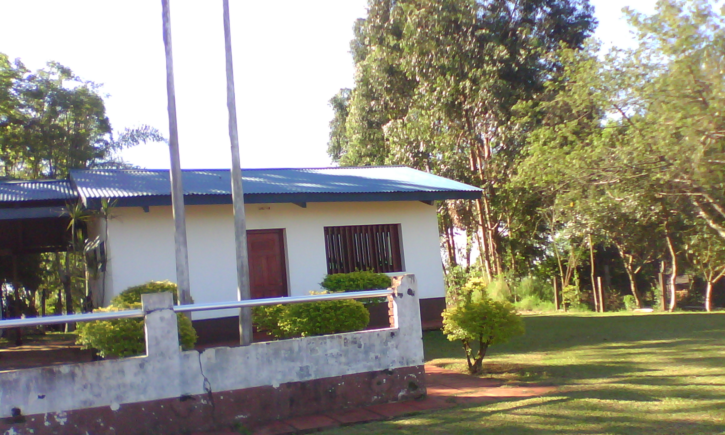 Destacamento policial. Fracrán, Prov. de Misiones.